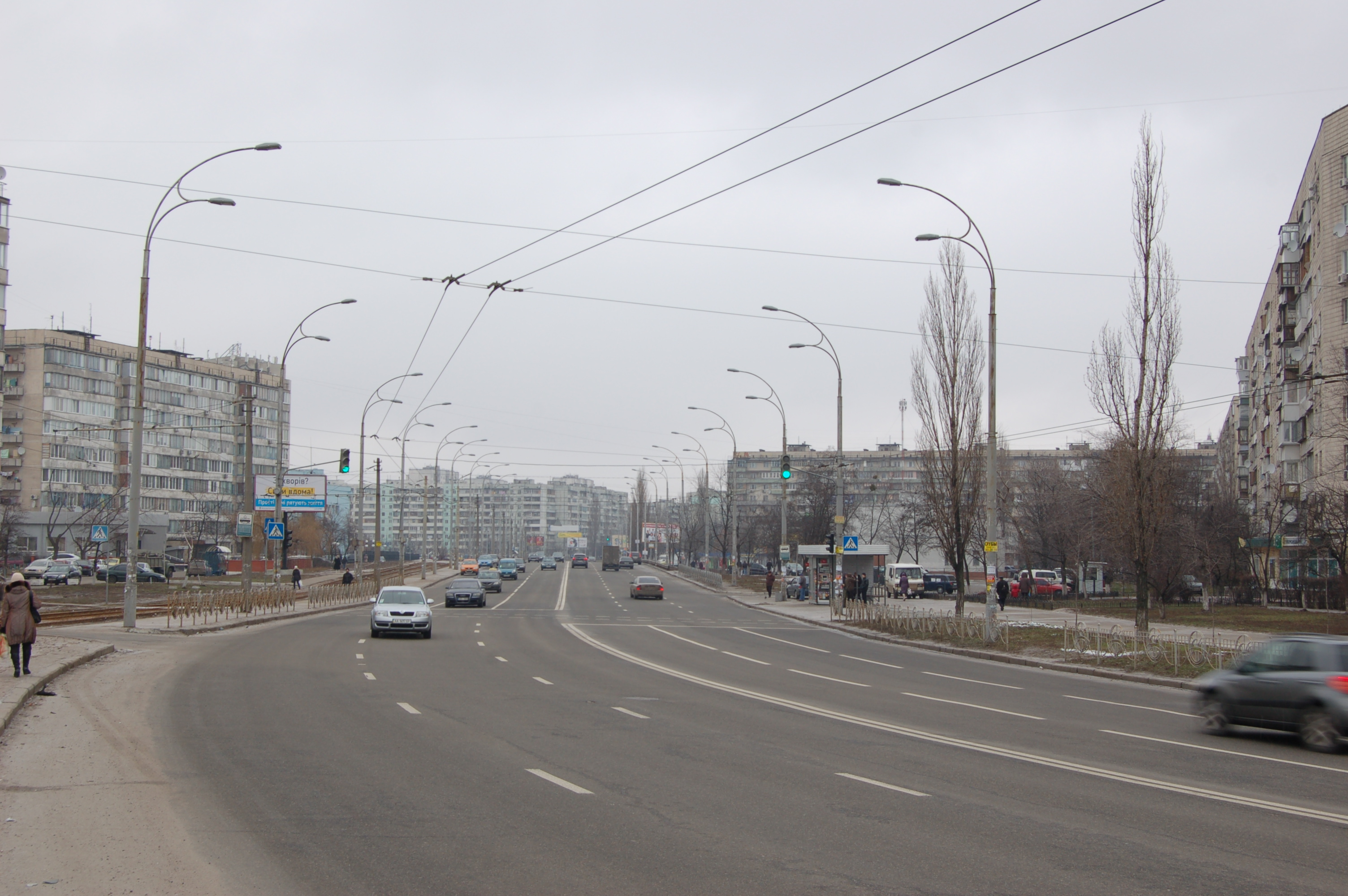 Улица Маршала Малиновского в Киеве